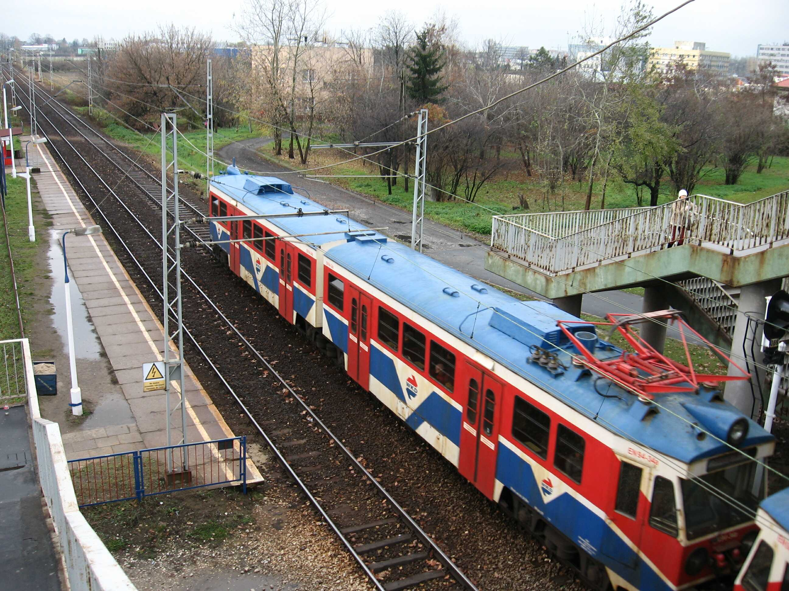 EN94 electric multiple unit at Warszawa Raków